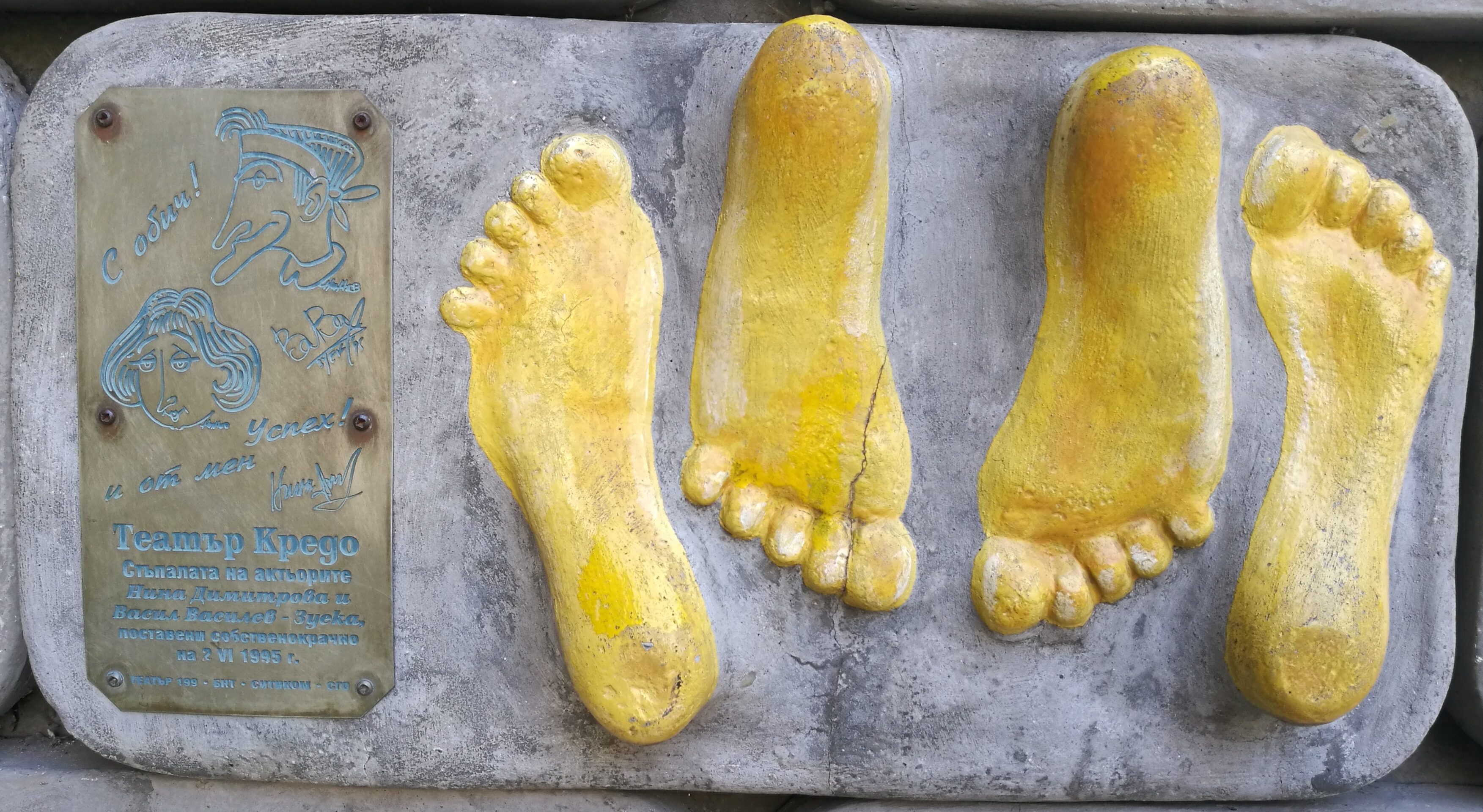 Стената на славата пред Театър 199 - пано с отпечатъци, послание и шарж на Васил Василев-Зуека и Нина Димитрова.